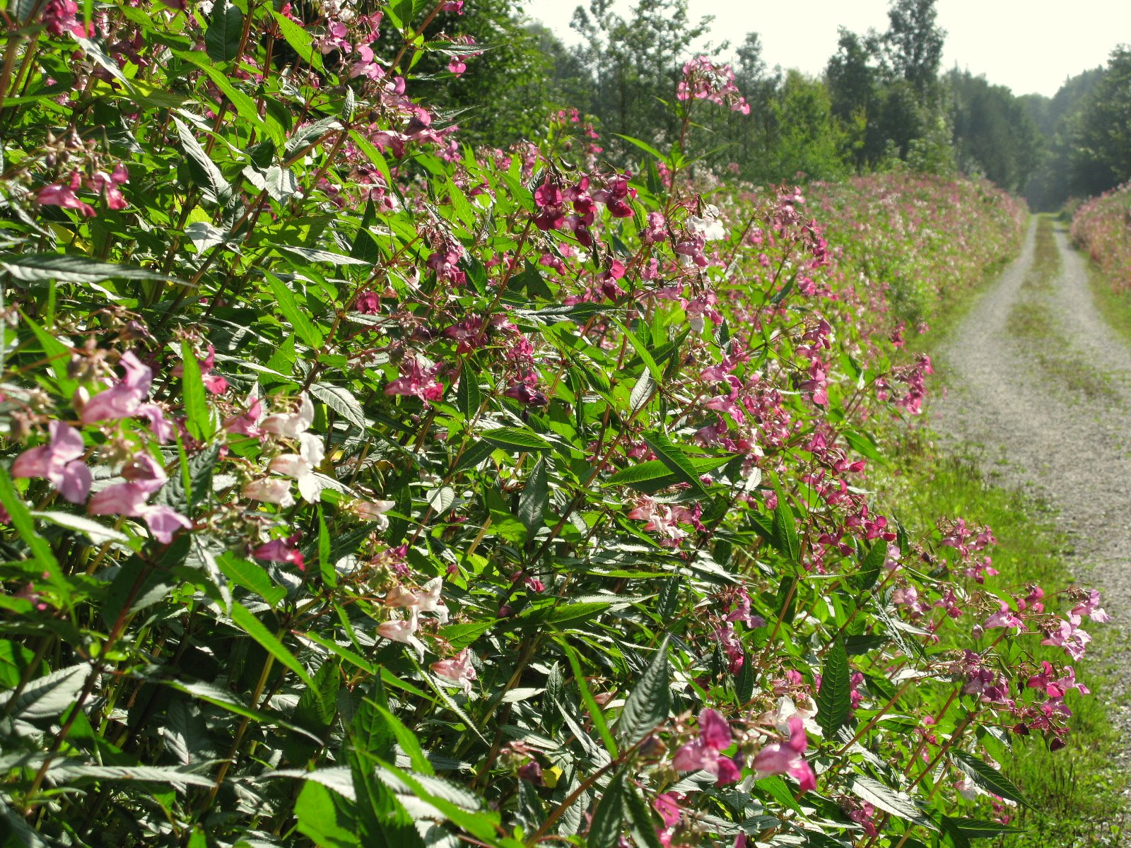 Заросли Бальзамина. Сфотографировано на юге Германии.